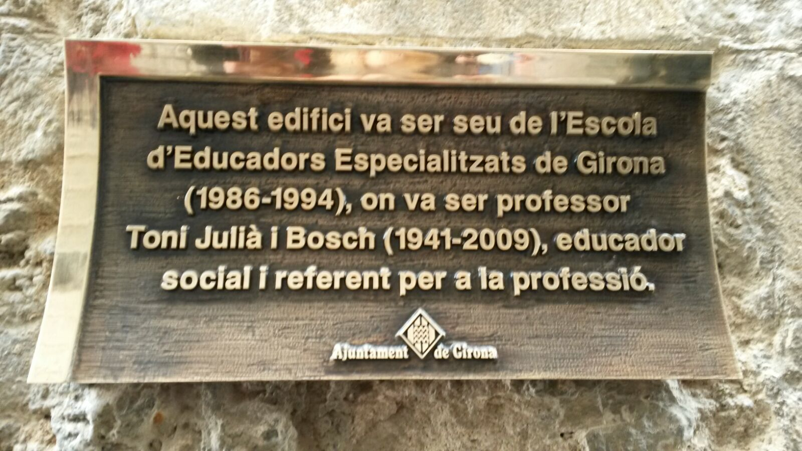 A la façana de l'antiga seu de l'Escola d'Educadors Especialitzats de Girona es recorda a Toni Julià